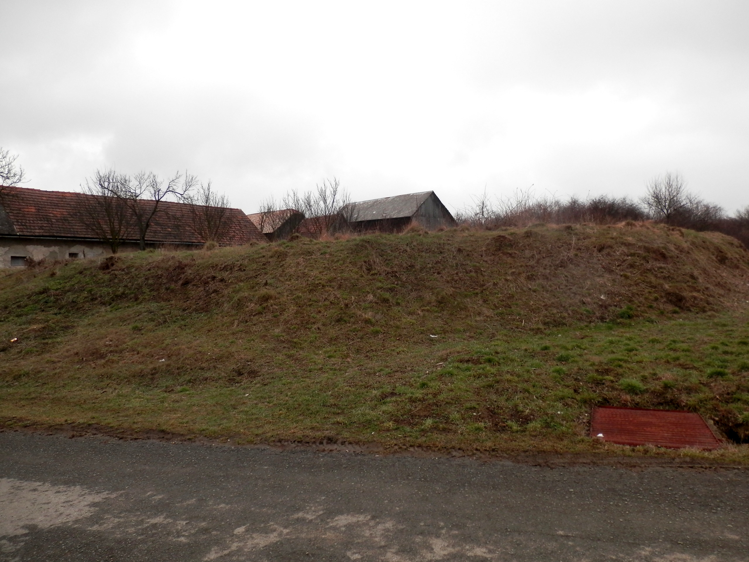 Miesto kde pôvodne stal už zaniknutý kostol. Obec Záhradné